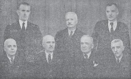 Борд на Илинденската организация